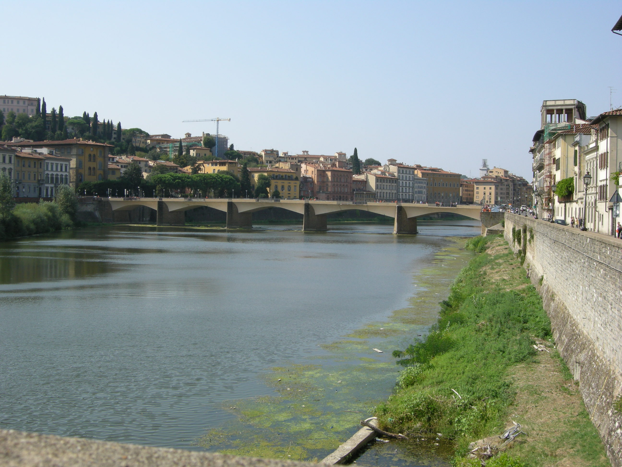 Firenze, lungarno e ponte alle grazie